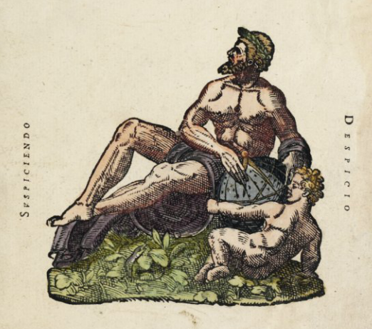 Allegoria philosophiæ Tychonis, impressa in prima pagina libri sui de Astronomiæ instauratæ Mechanica